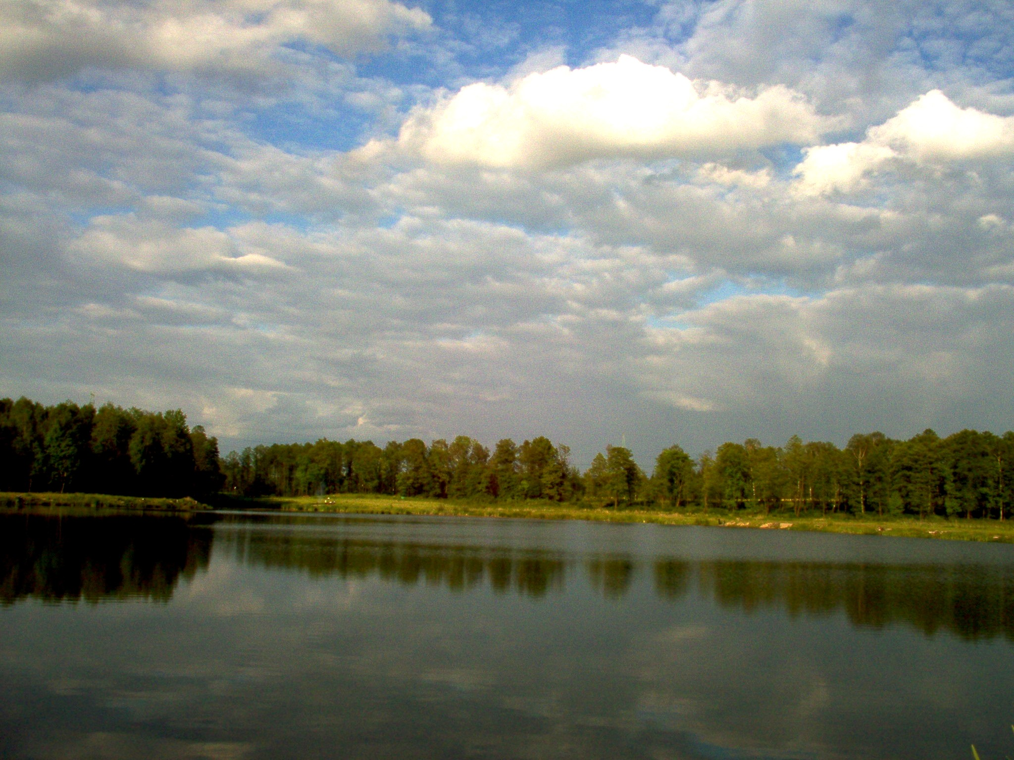 Staw Barbara zlokalizowany w pobliżu osiedla Giszowiec w Katowicach.Zdjęcie wykonałam osobiście wiosną 2004. Data w aparacie była wadliwie ustawiona.